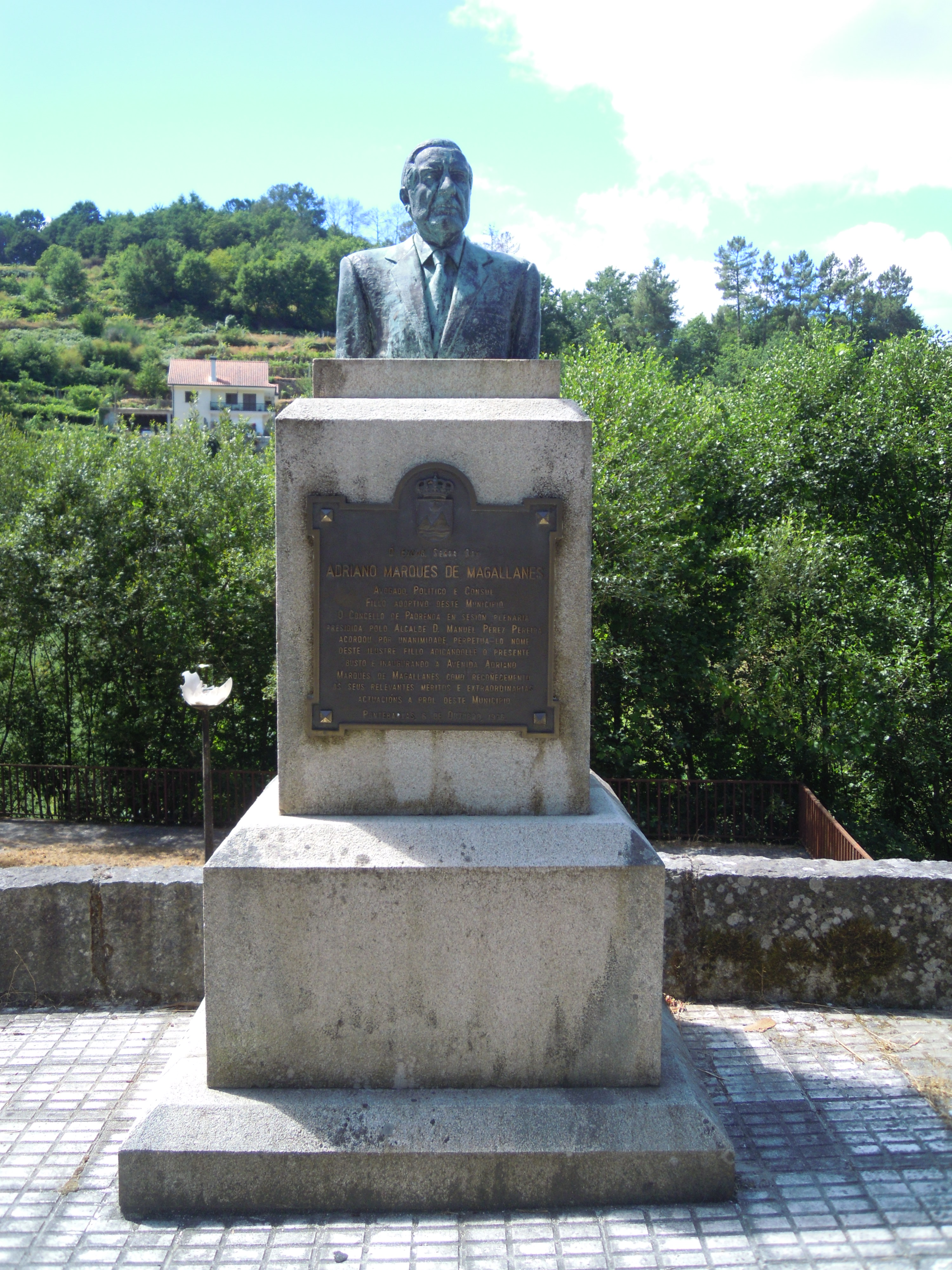 Escultura a Adriano Marques de Magallanes en Ponte Barxas (Padrenda)